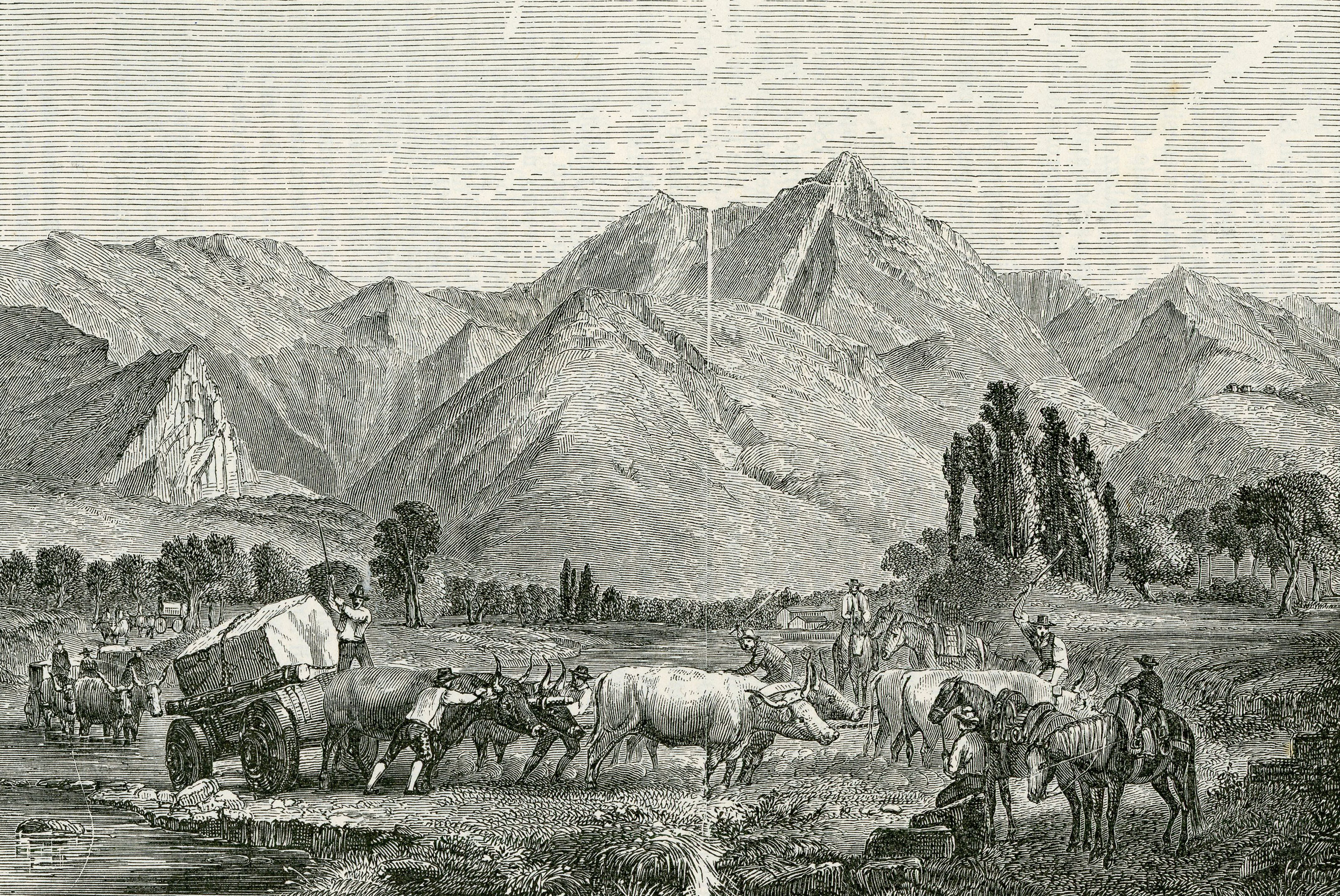 Veduta generale dei monti marmiferi di Carrara, presa dall’Arena .